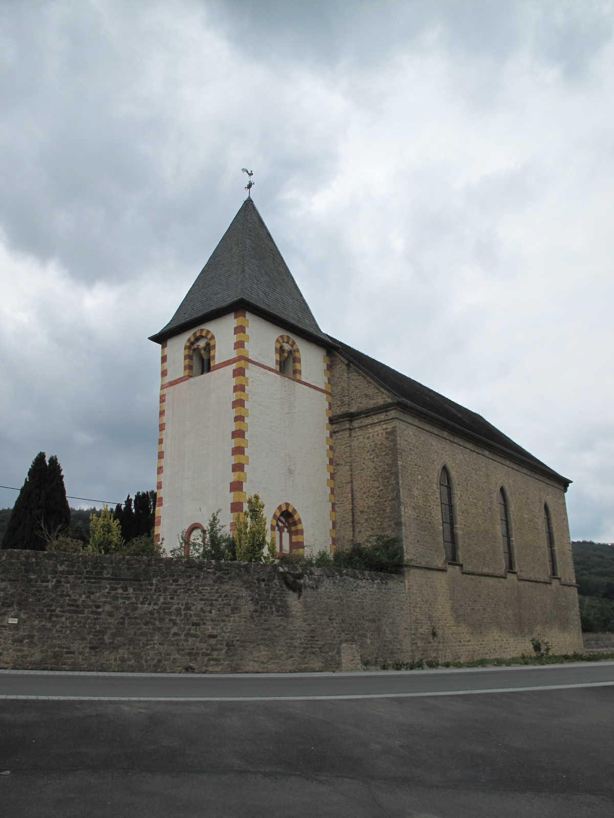 röm.-kath. Filialkirche Niederweis (Eifelkreis Bitburg-Prüm).